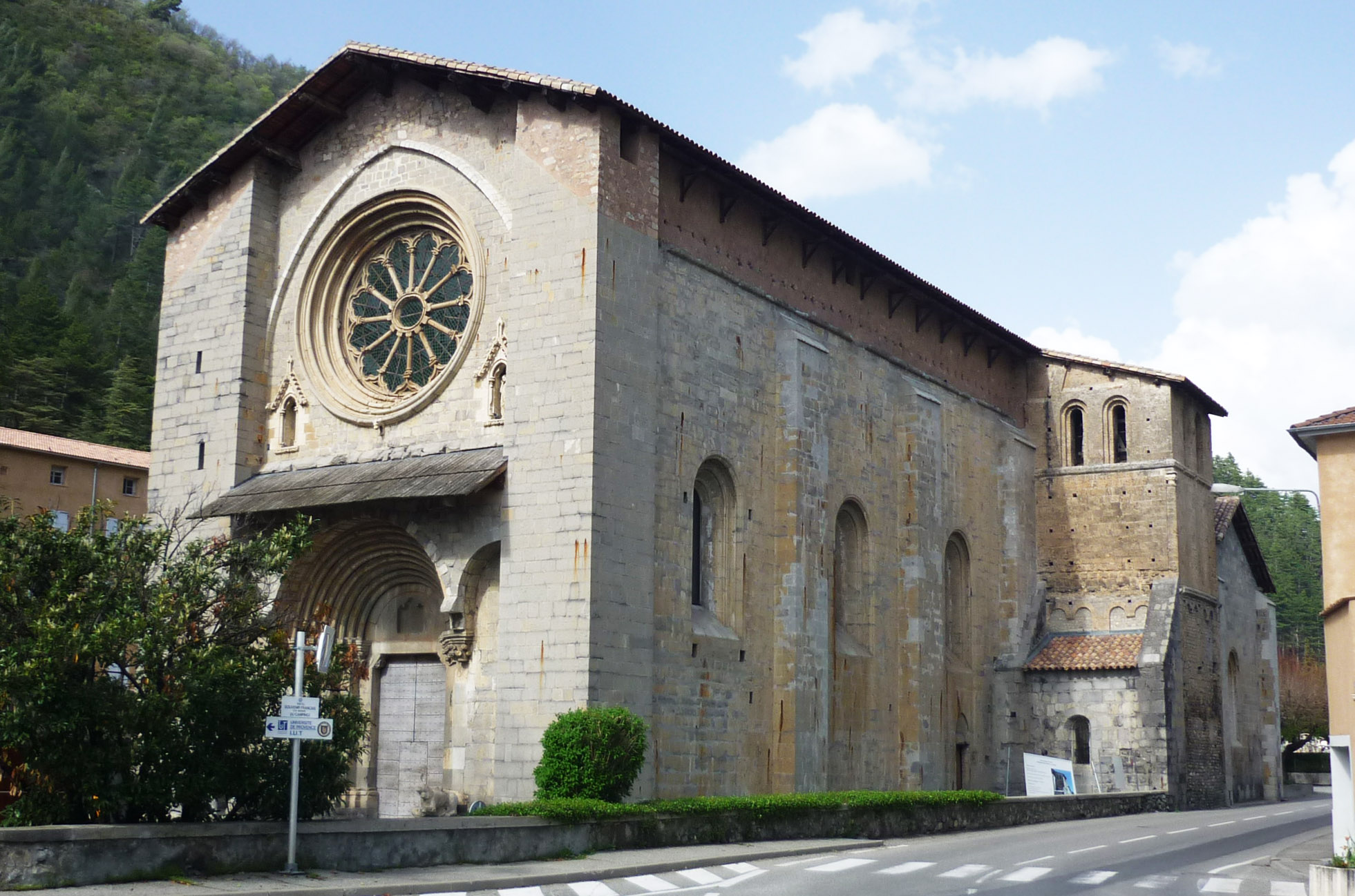 Alte Kathedrale von Digne-les-Bains im Ortsteil Bourg